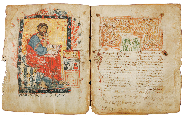 ოთხთავი (A-496)